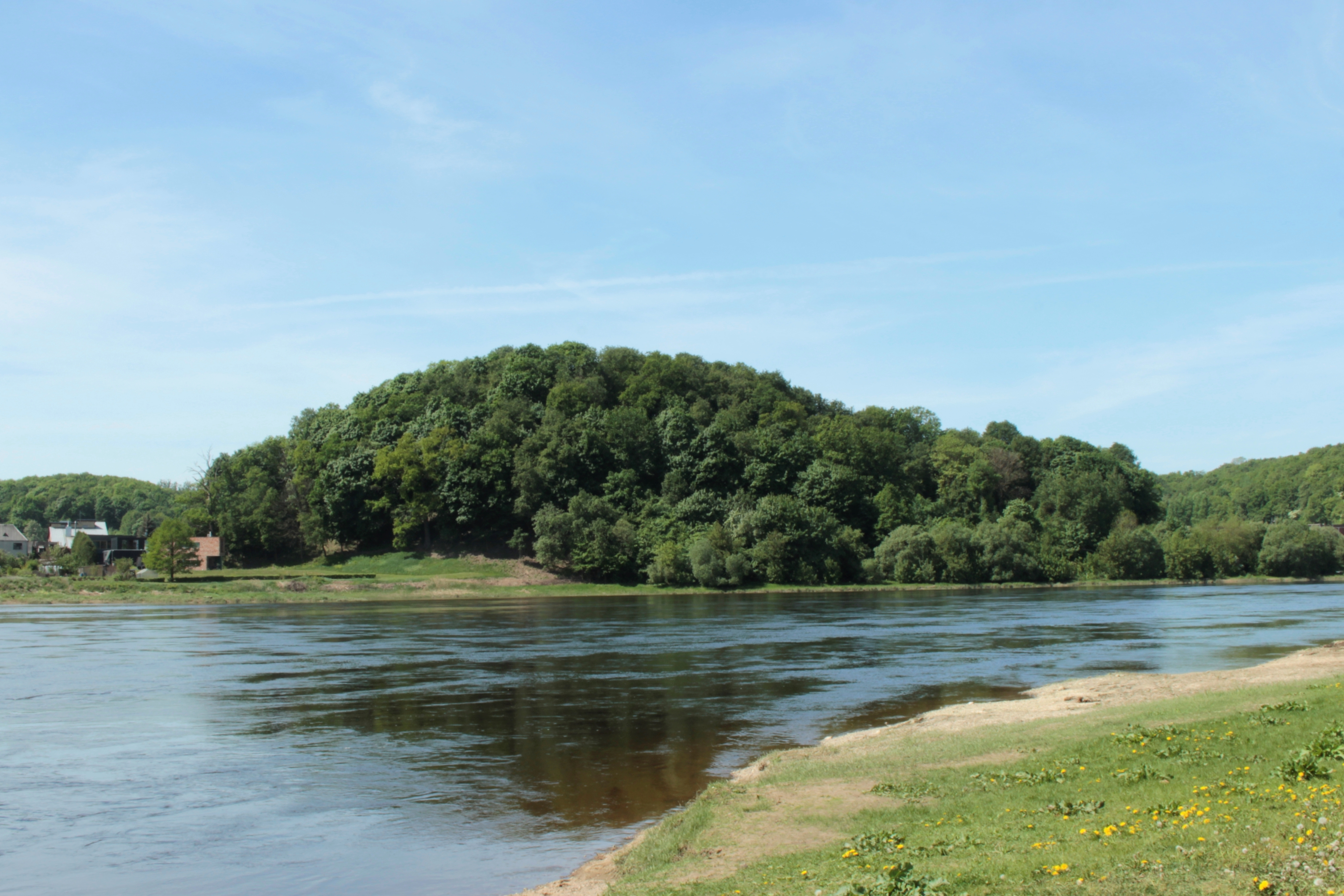 Jiesios piliakalnis iš kito Nemuno upės kranto